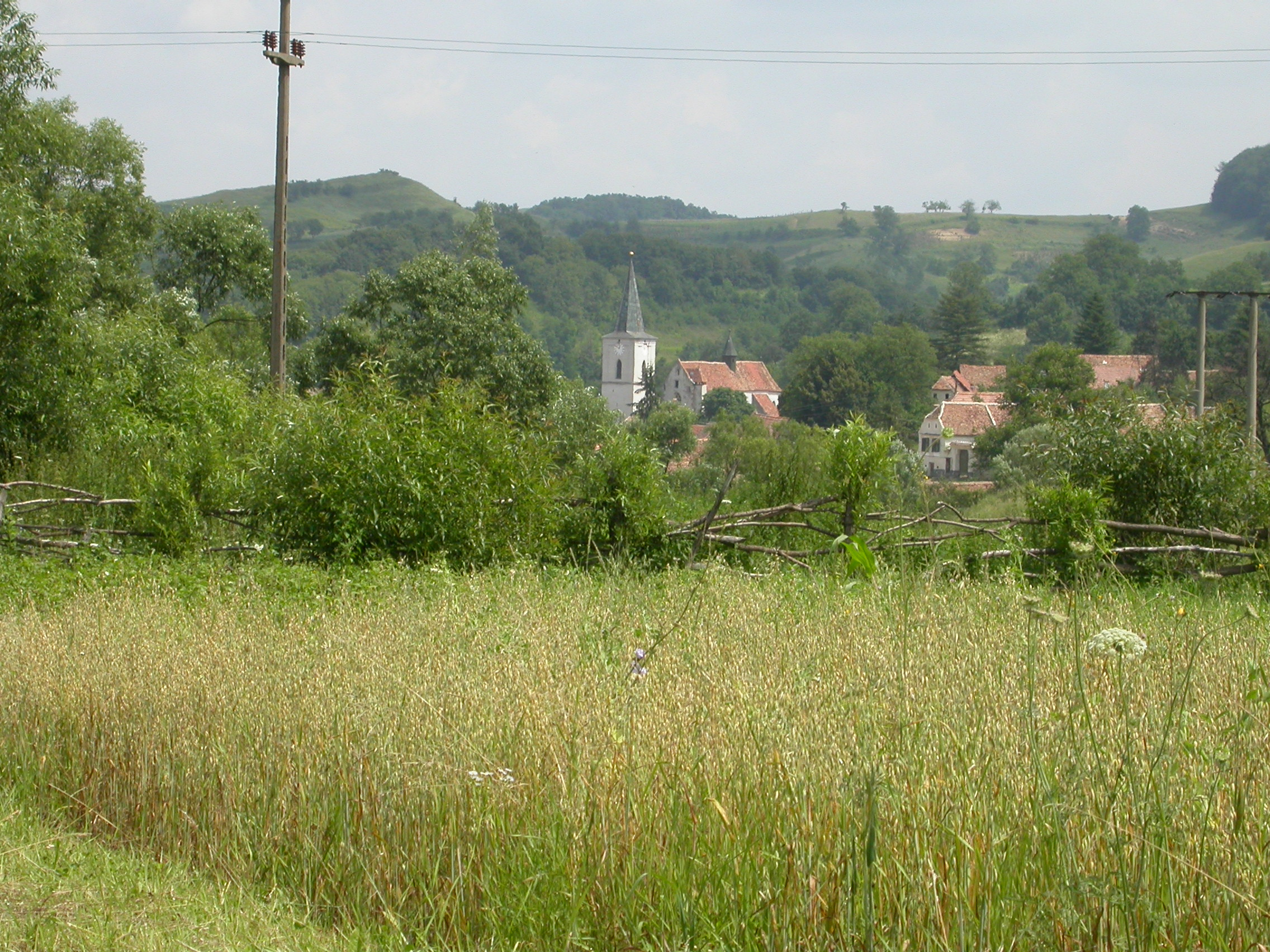 Ansamblul rural "Centrul istoric"